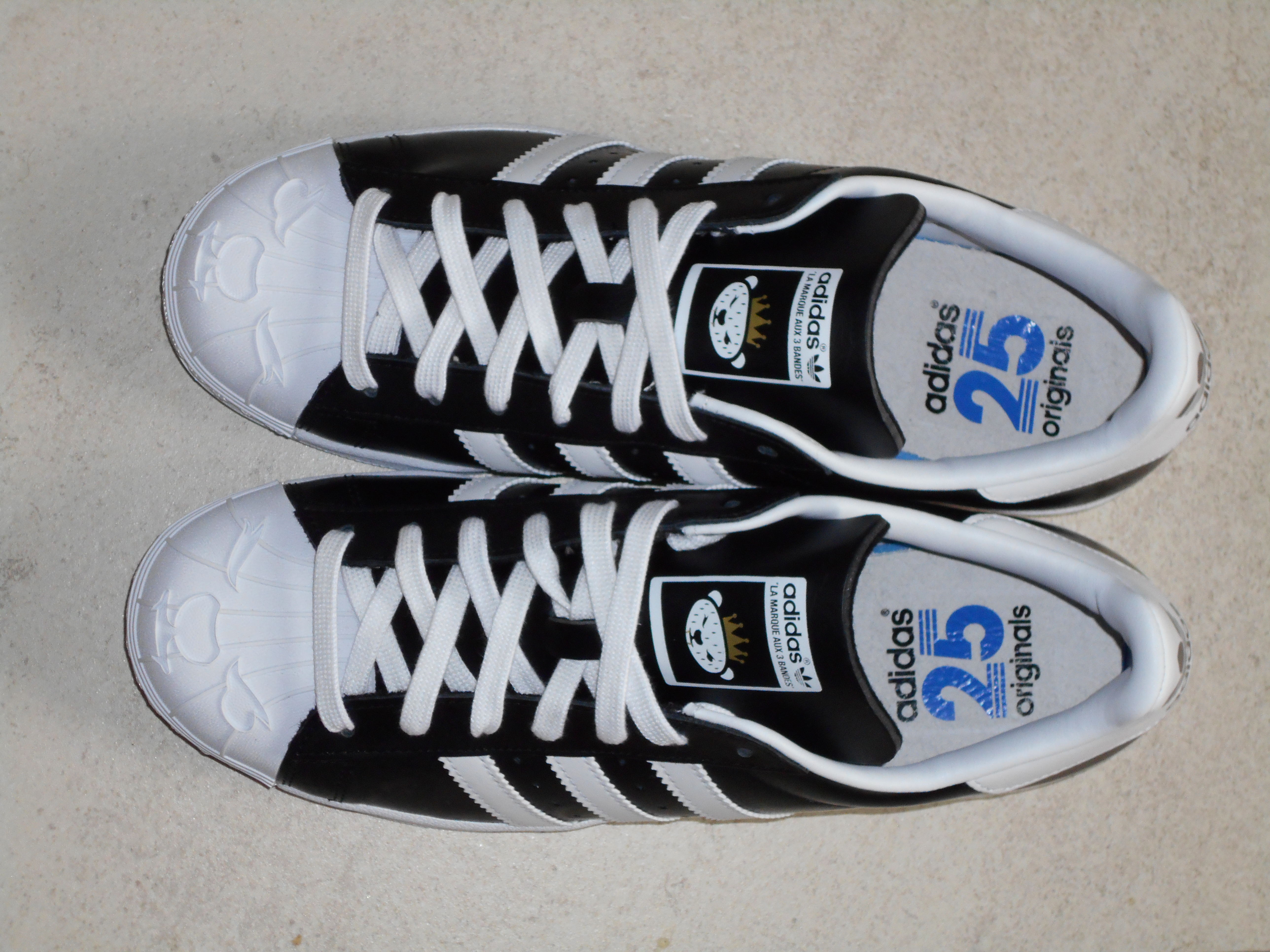 Superstar Nigo Bearfoot (S83386). On y voit l'ours royal (Bearfoot) et le nombre 25 ("Nigo")